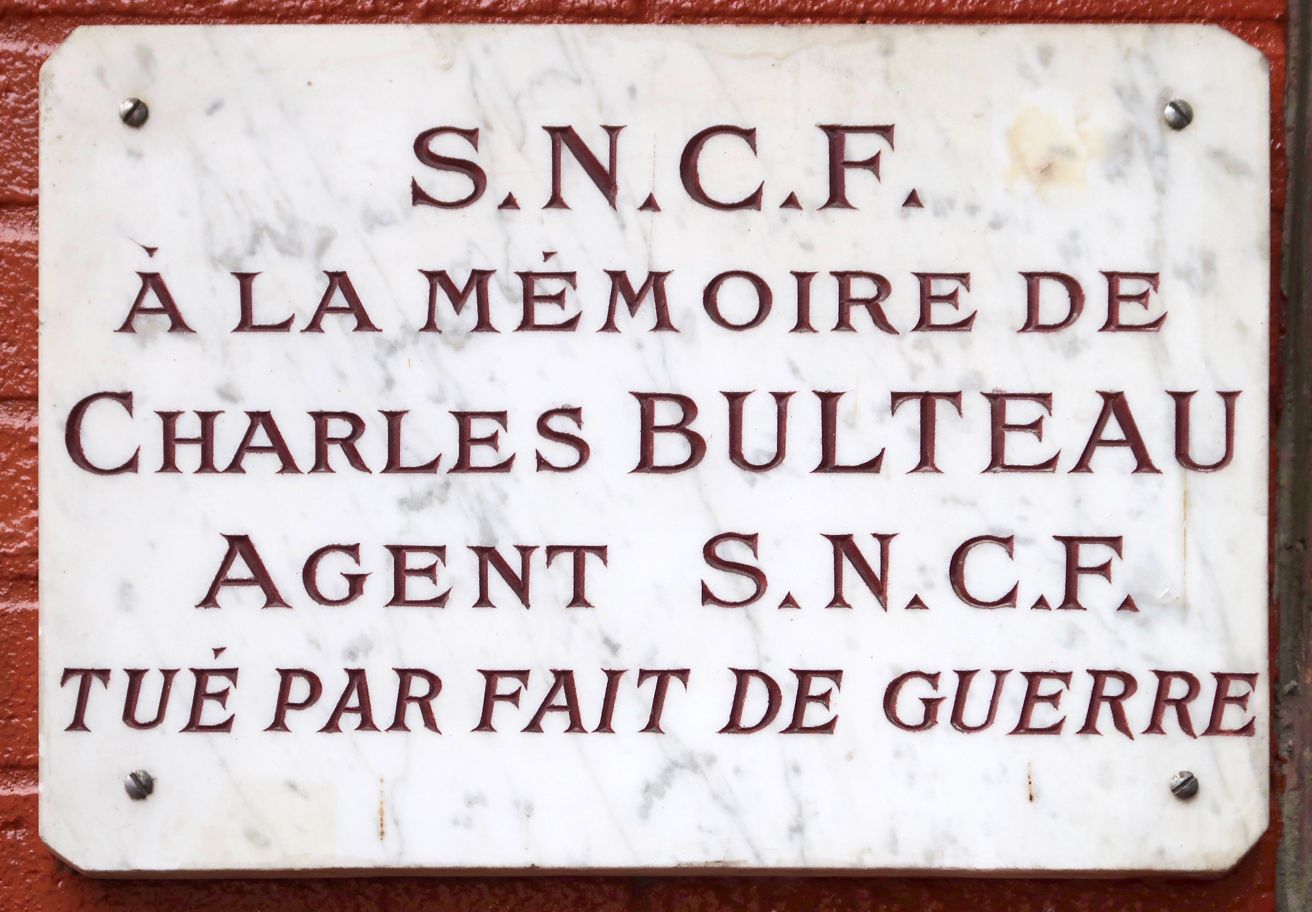 Plaque en mémoire de l'agent SNCF Charles Bulteau, tué par fait de guerre, située dans la gare de Suresnes-Mont-Valérien (Hauts-de-Seine).